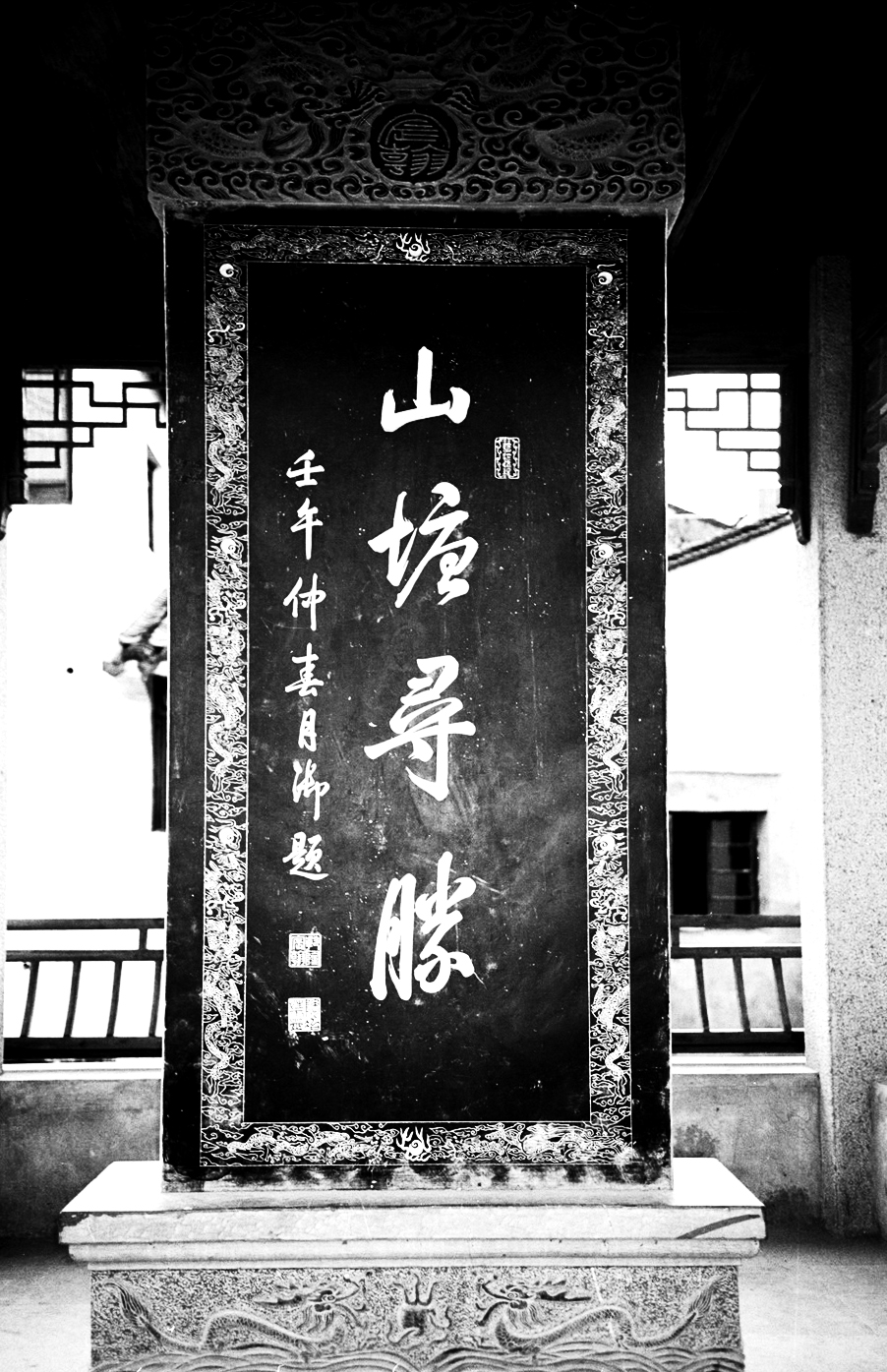 乾隆帝“山塘寻胜”御碑 唐戈摄影 2005